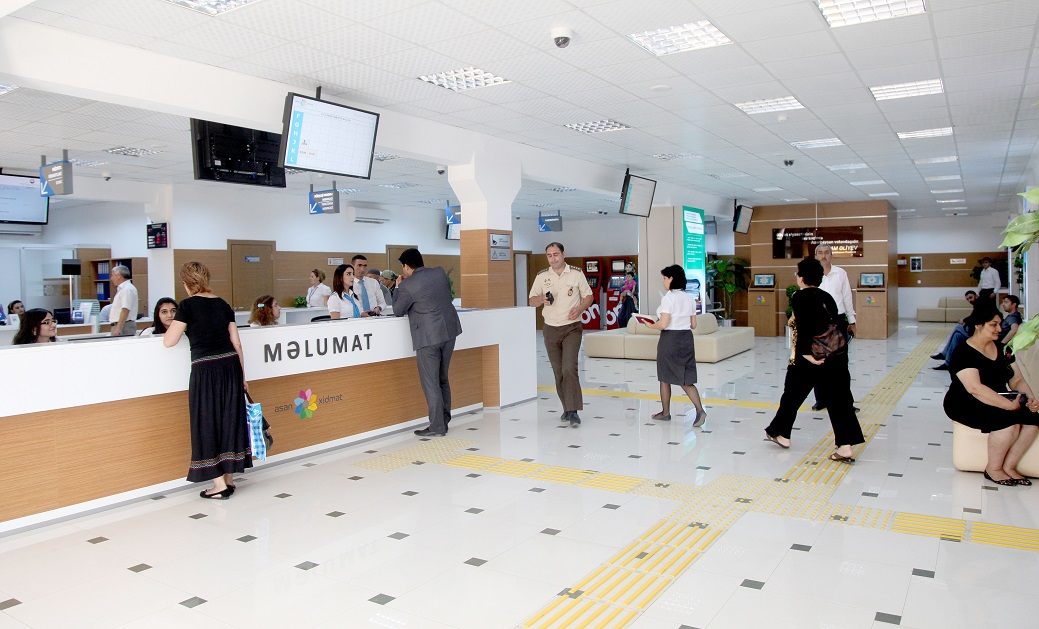 ASAN xidmət